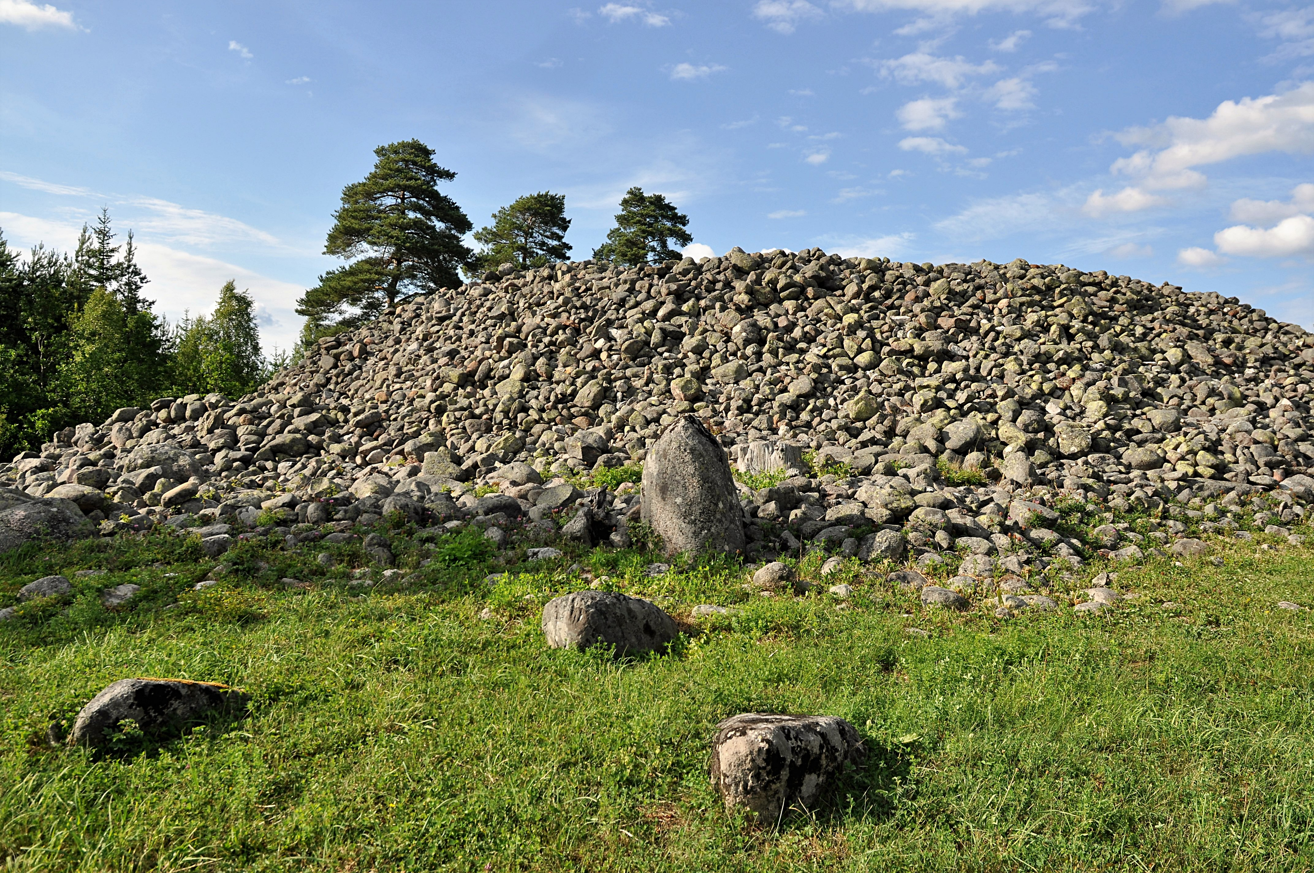 Röset "Majsterrojr" (Gothem 111:1), Gotland.